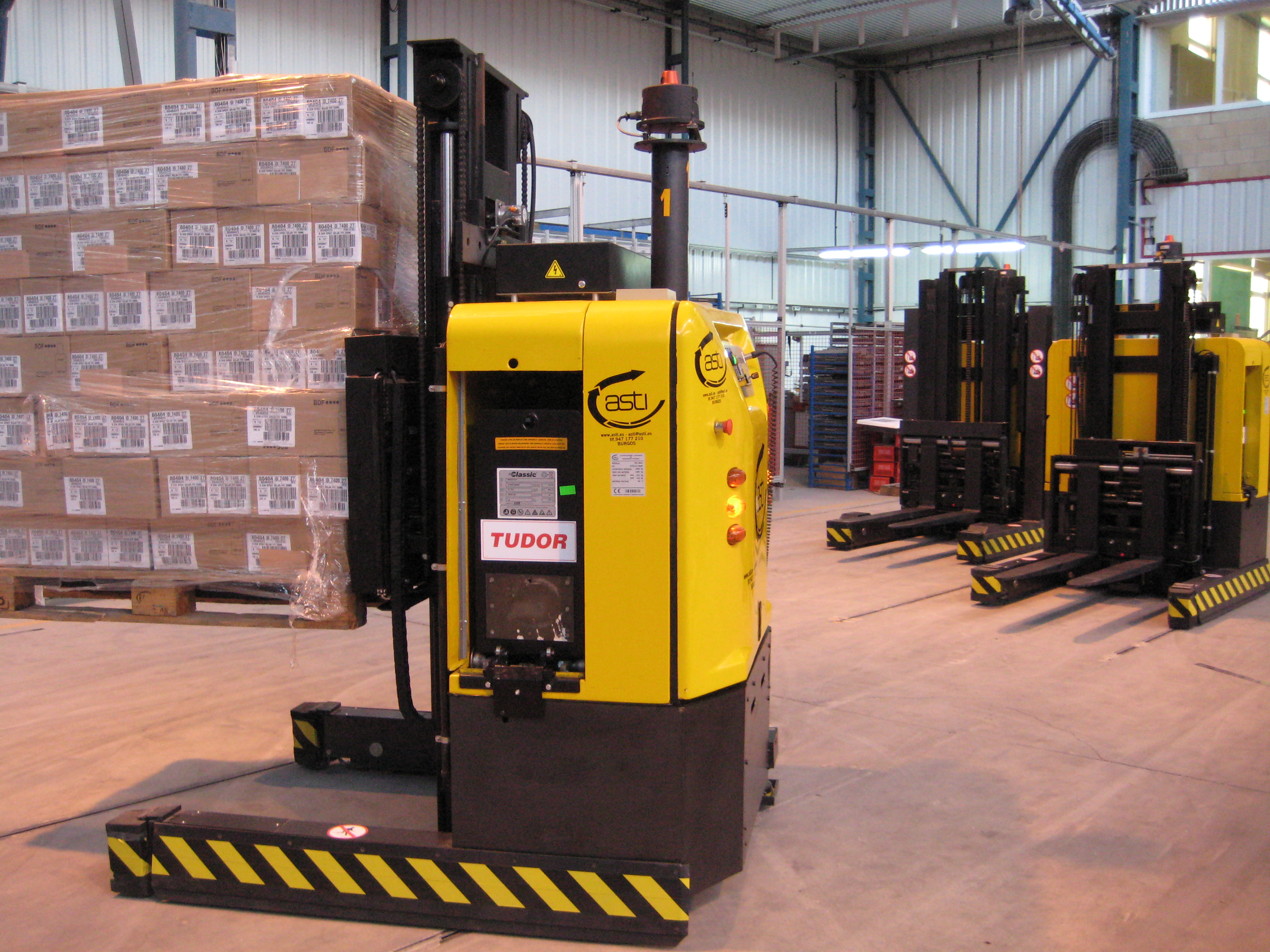 AGVs